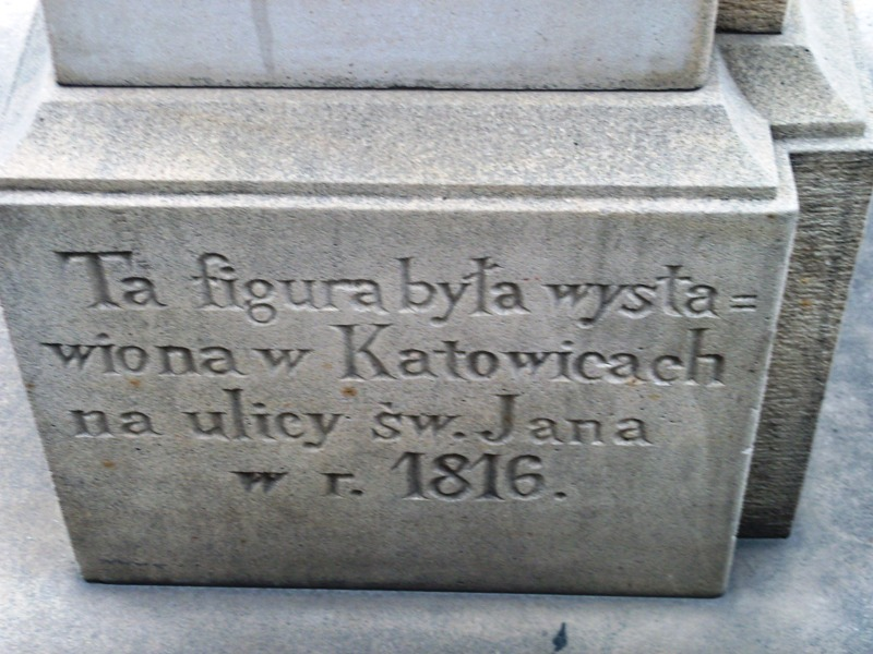 Napis na figurce świętego Jana przy ul. św. Jana w Katowicach